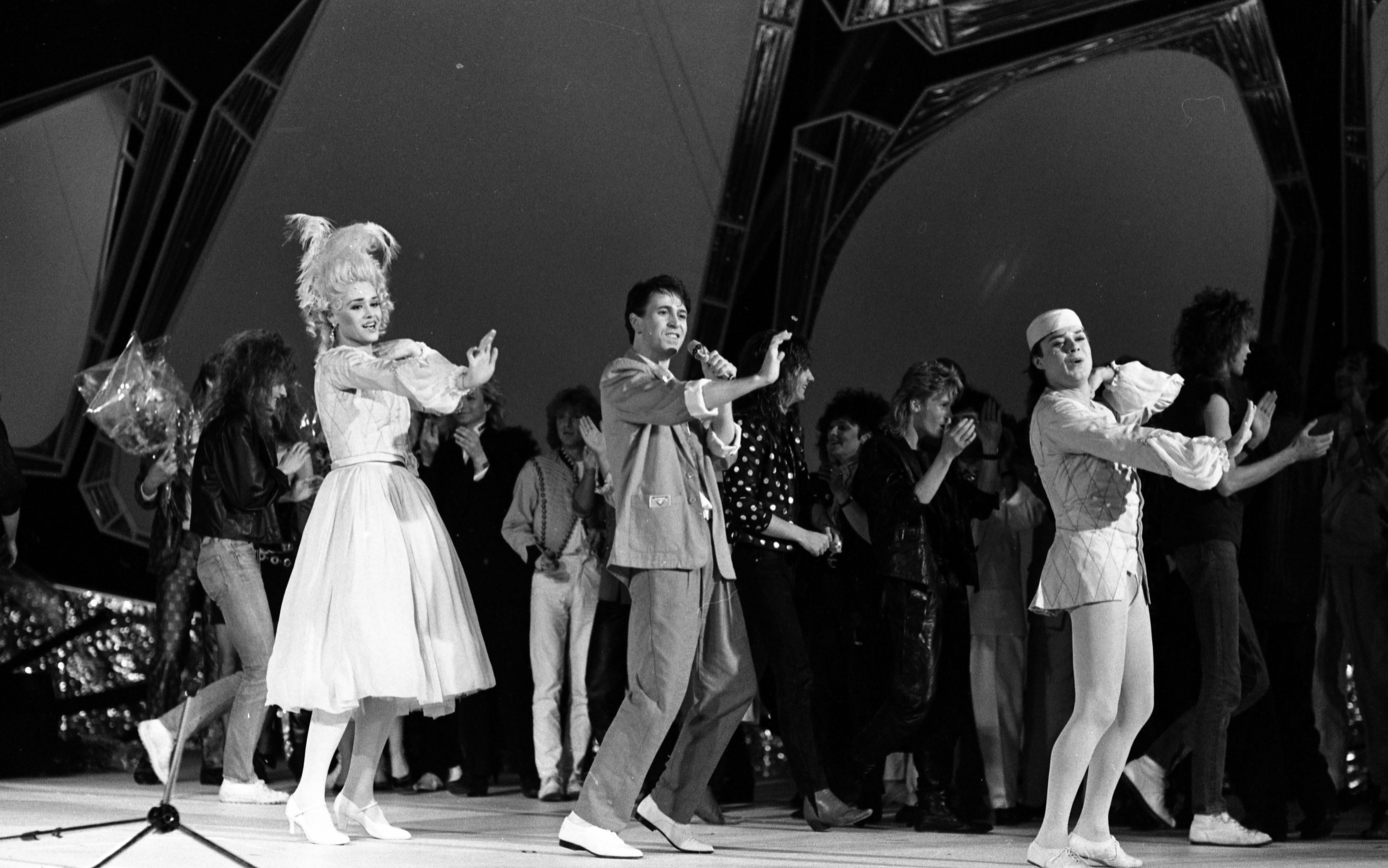 Melodi Grand Prix, norsk finale, 1986. Foto: Bo Mathisen. Arkivref.: PA-0797_U_13638_008_016